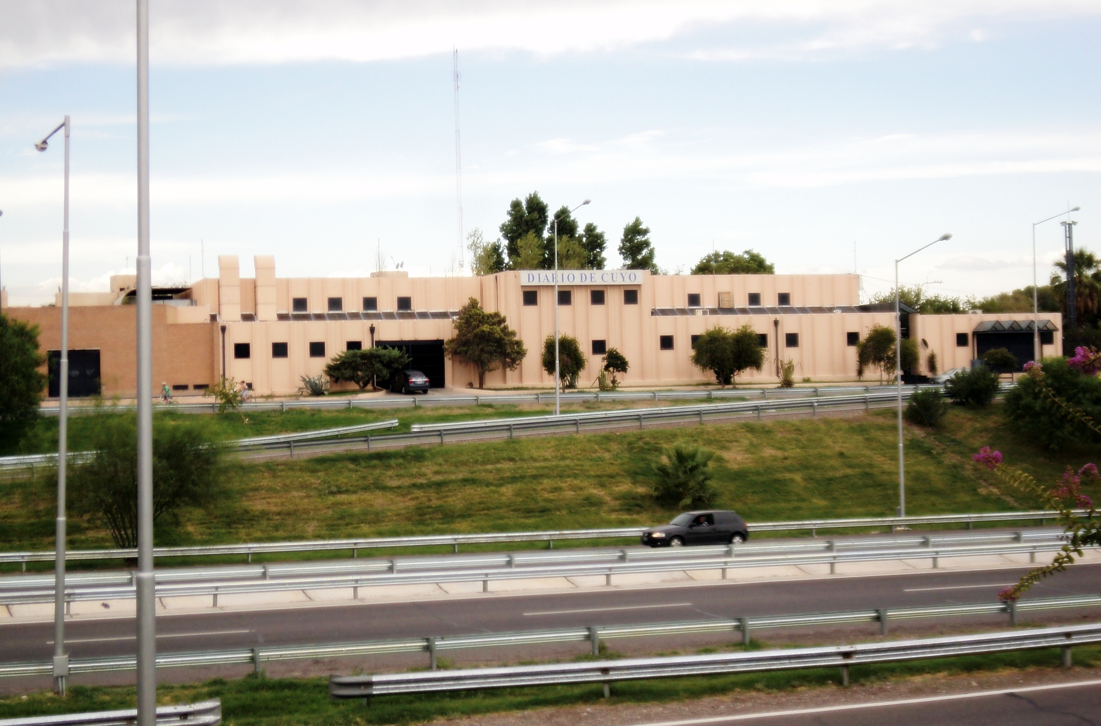 EDIFICIO DE PRODUCCION DESDE LA AV CIRCUNVACION